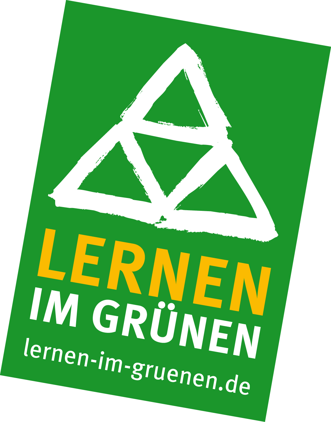 Lernen im Grünen - Sympathiemarke